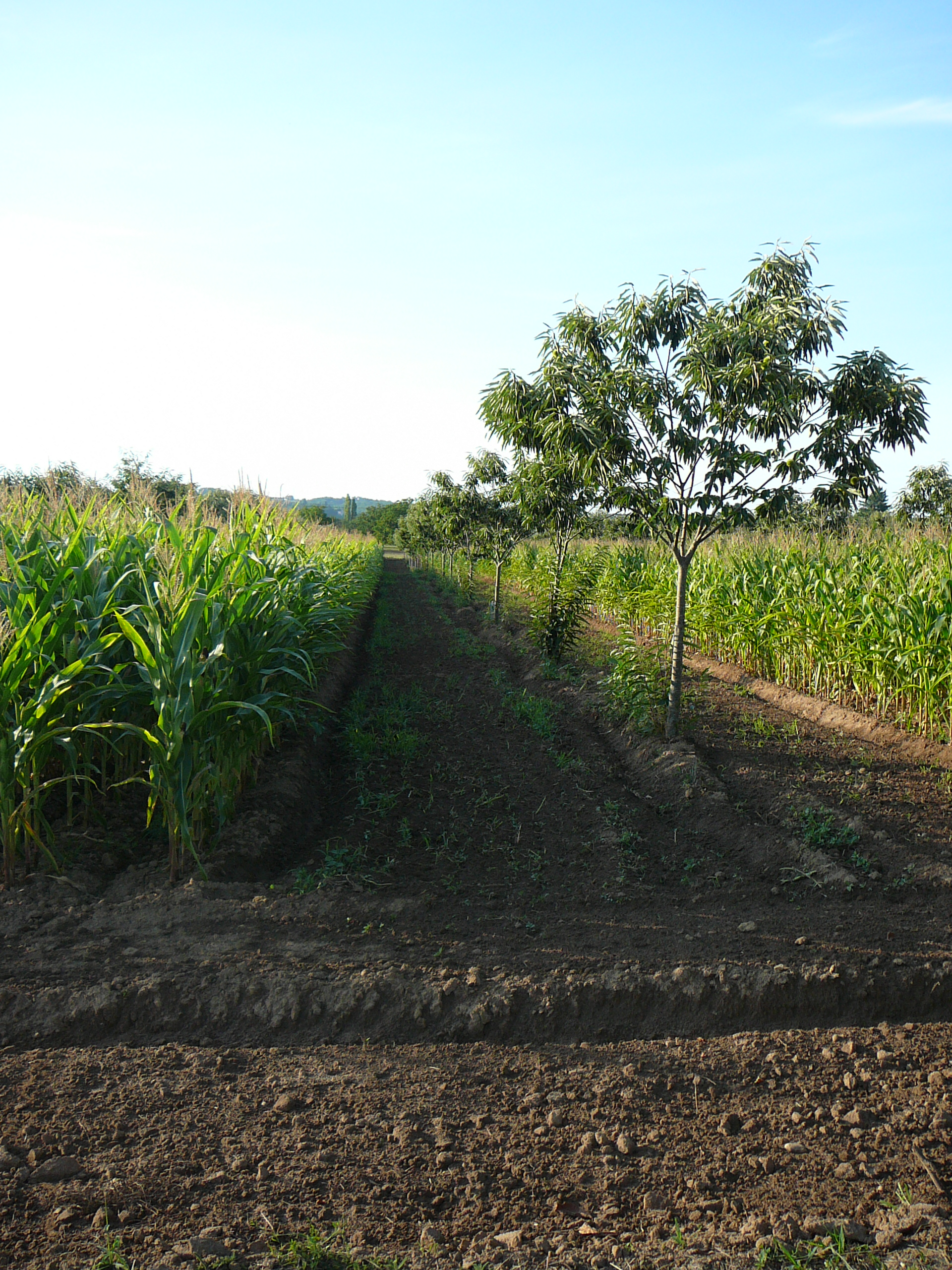 Maïs et châtaigners en agroforesterie en Dordogne.